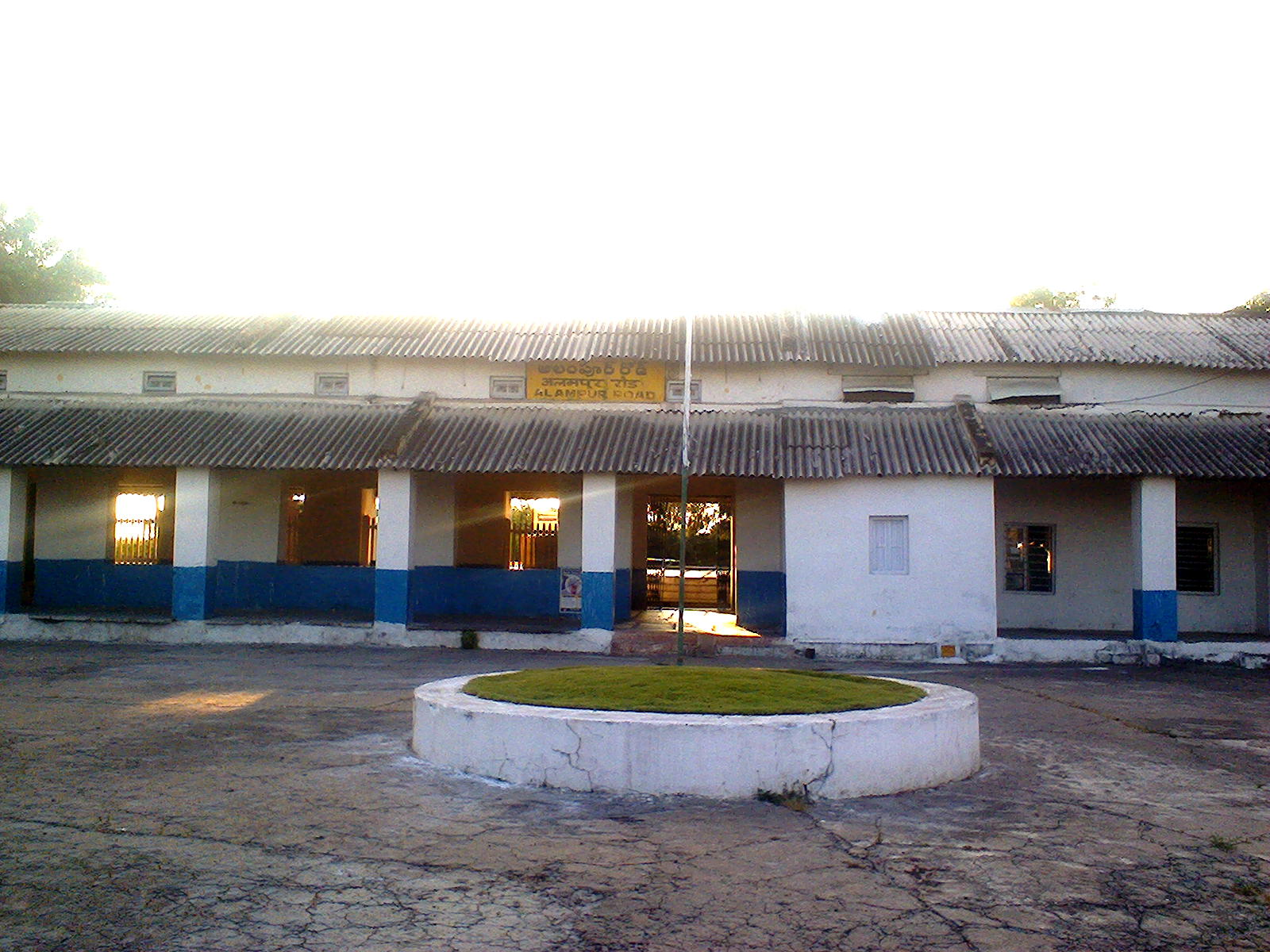 Alampur Road Rail Station